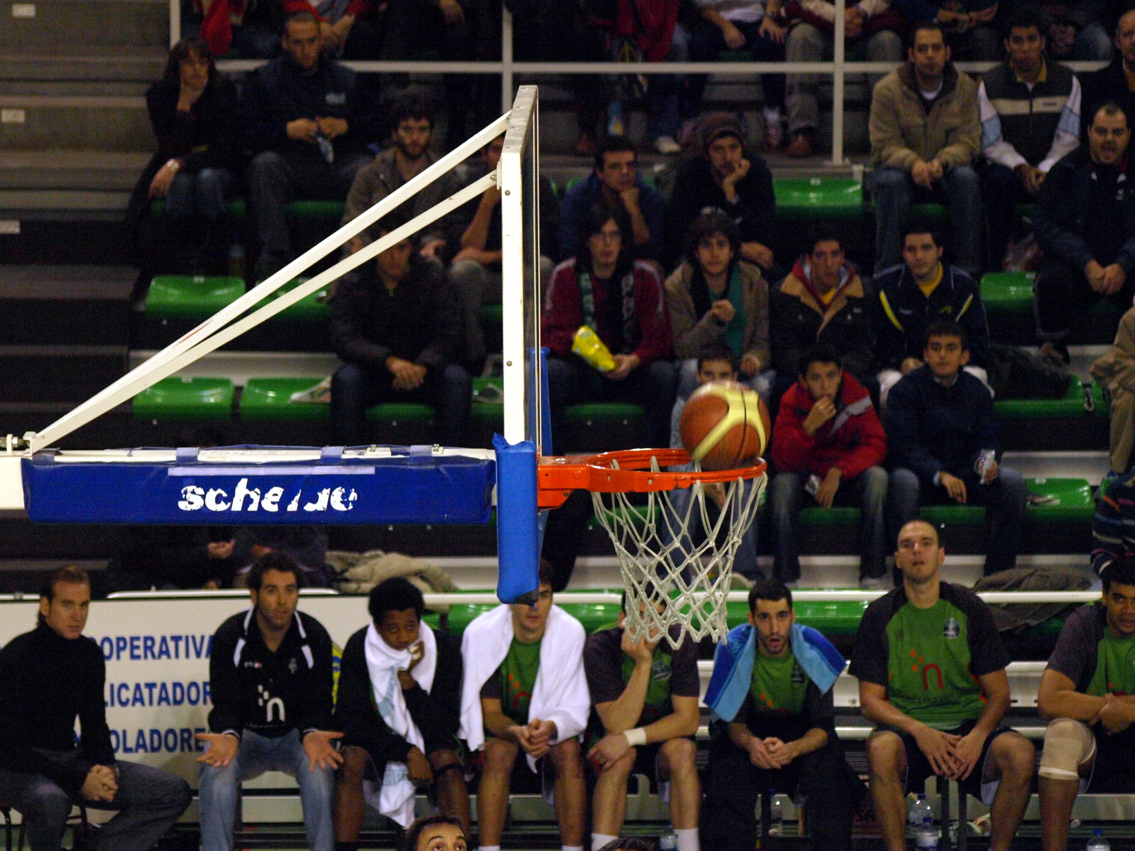 Canasta de baloncesto en el Pabellón Multiusos Ciudad de Cáceres